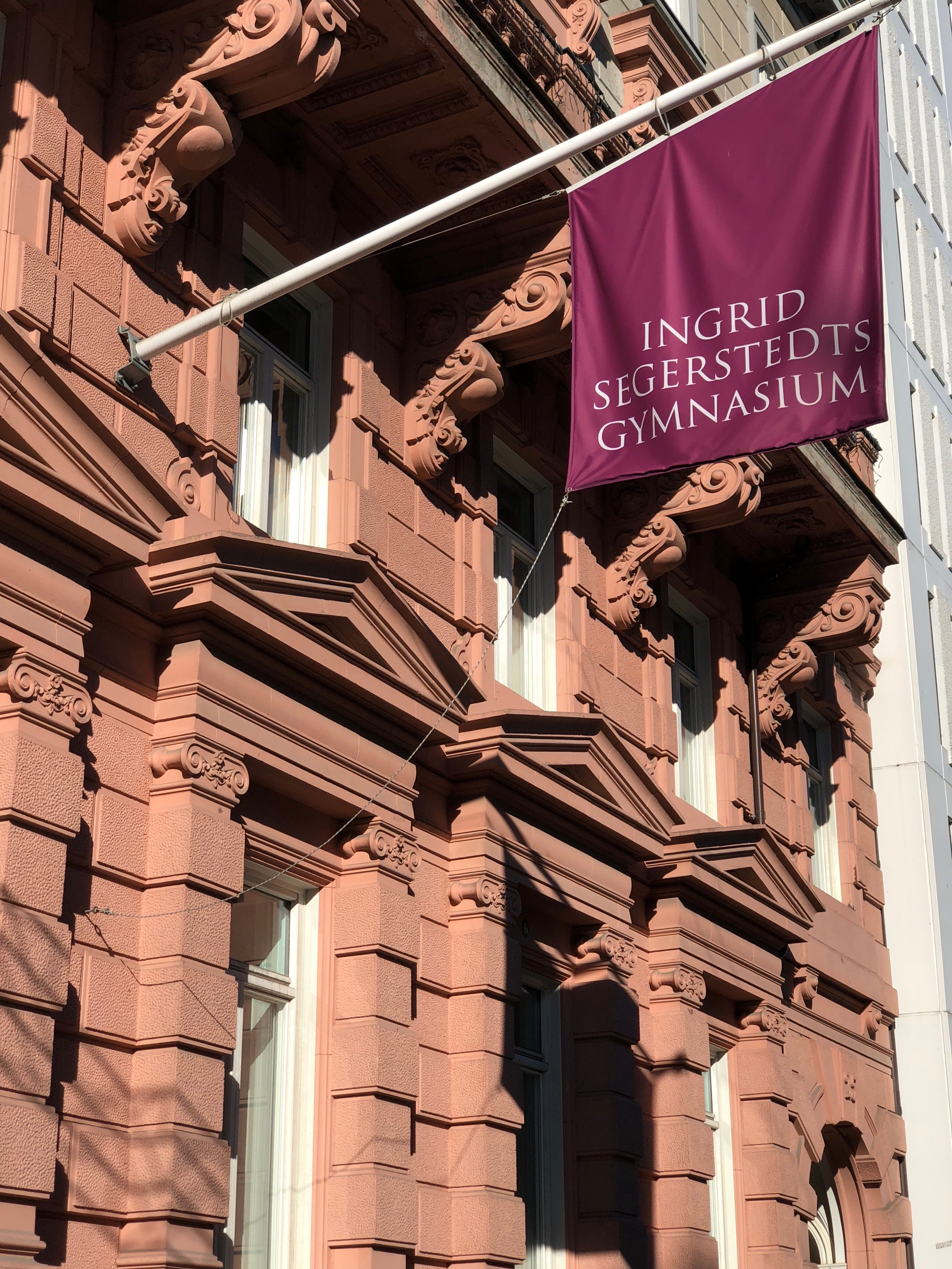 Skolbyggnad